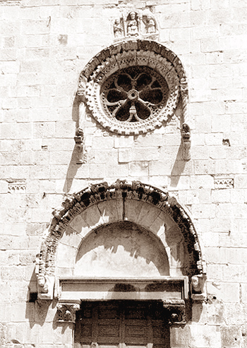 Particolare della facciata di transetto della chiesa di san Severino a San Severo. File creato da Tobia Gorrio. Categoria:Immagini di San Severo